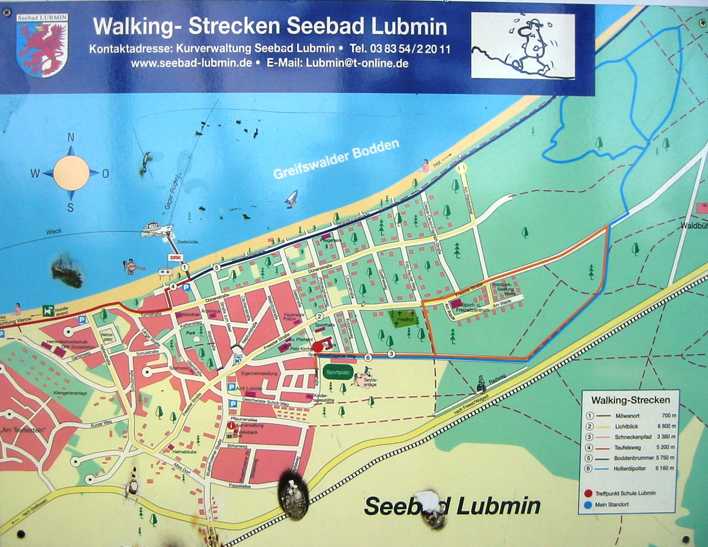 Lubmin], einer Gemeinde im Landkreis Ostvorpommern. Die Karte befindet sich vor der Ferienanlage "Zum Knirk" im östlichen Teil der Gemeinde.